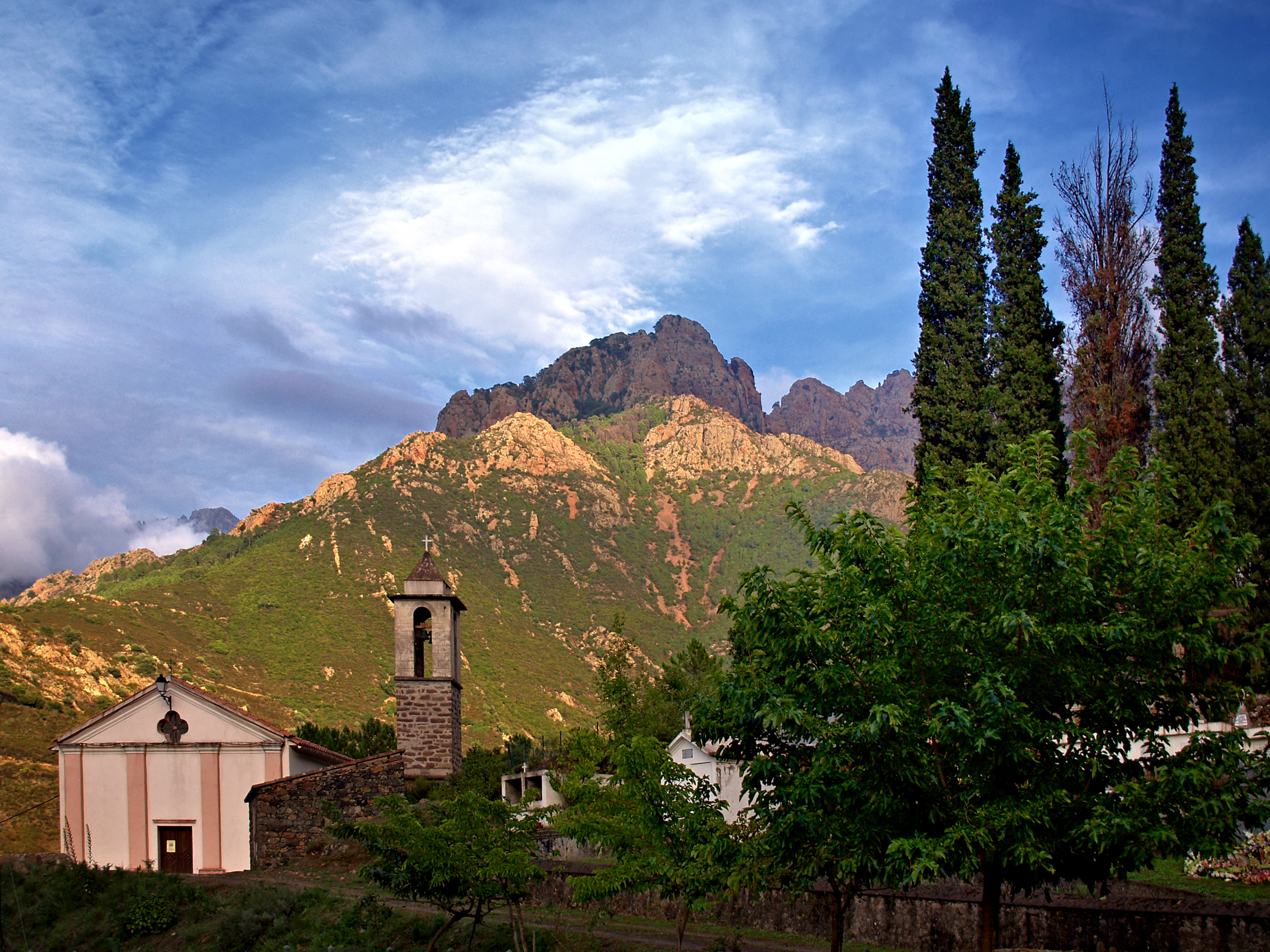 Manso (Corsica) - Église Saint-Pancrace et le cimetière